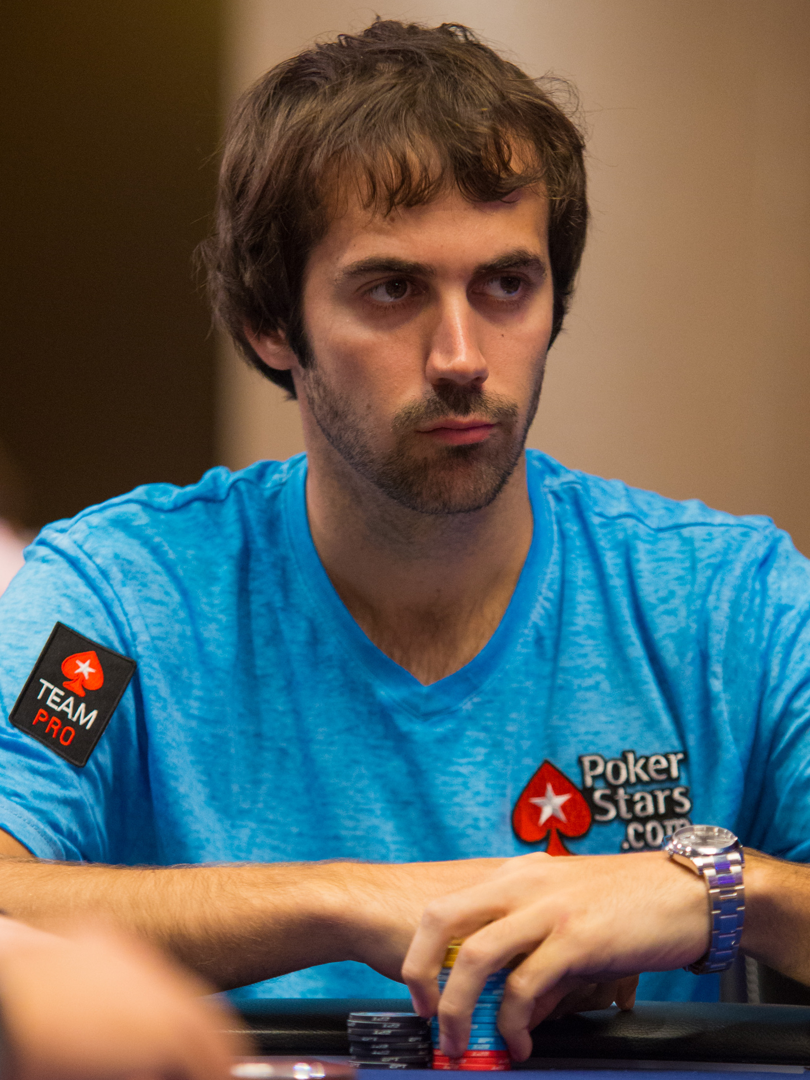 Jason Mercier an Tag 1 des EPT Super High Roller 2013 in Barcelona